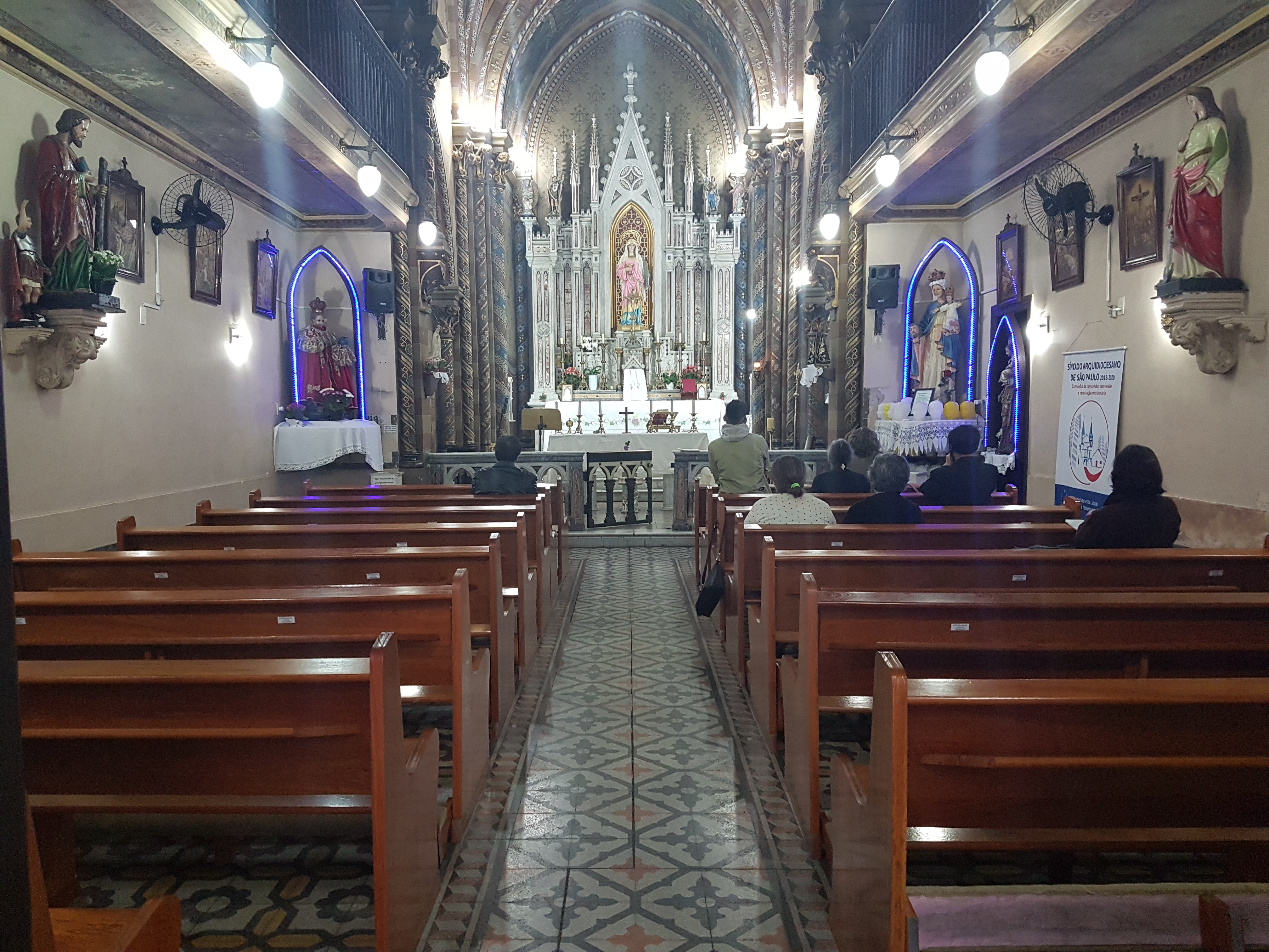 Capela do Menino Jesus e Santa Luzia, situada na Rua Tabatringuera, 104, região da Sé.